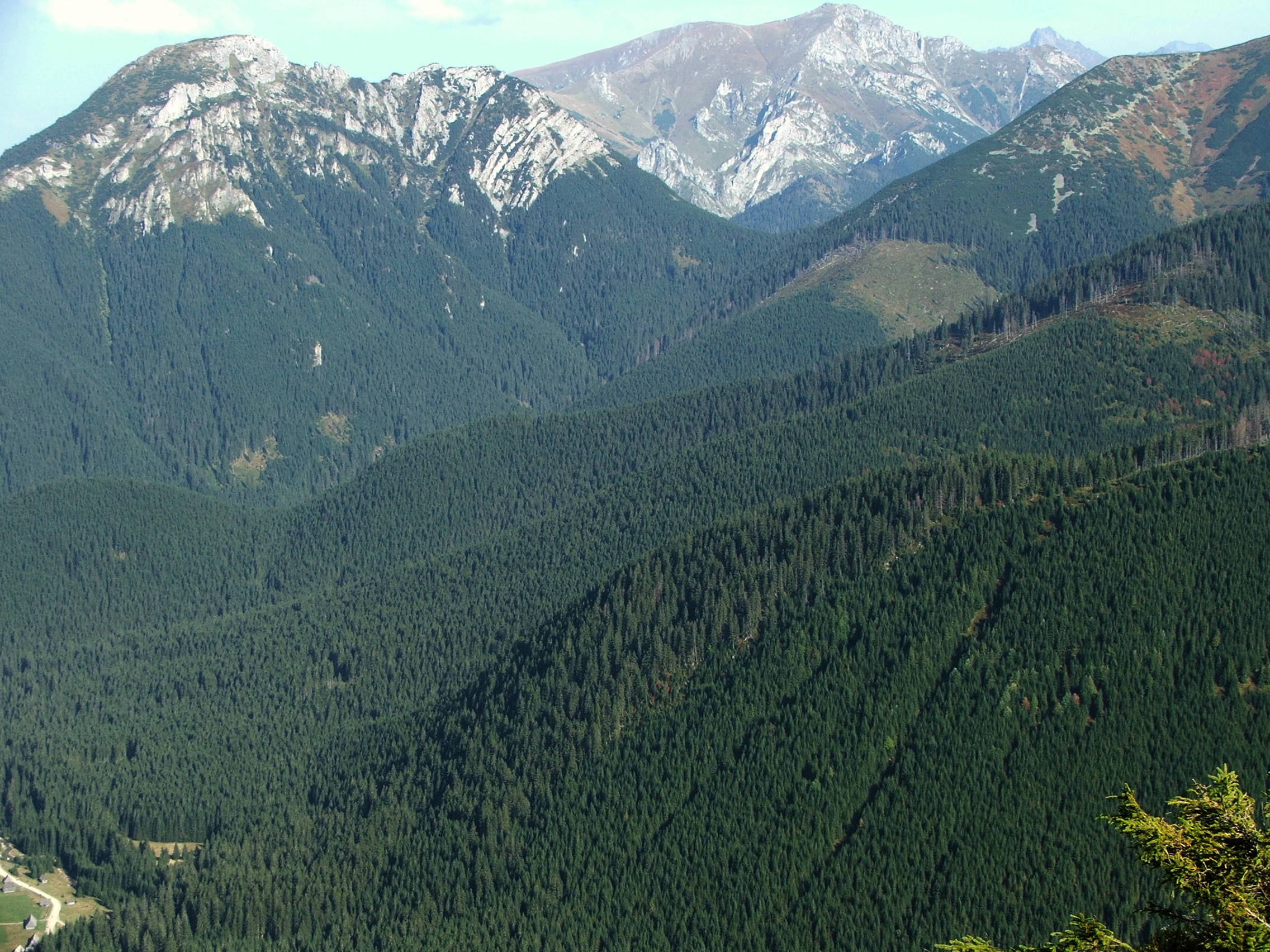 Kominiarski Wierch, Iwaniacka Przełęcz, Ciemniak, Ornak. Widok z Grzesia.